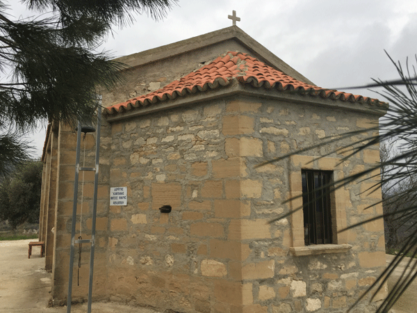 Άγιος Τρύφωνας-Θελέτρα